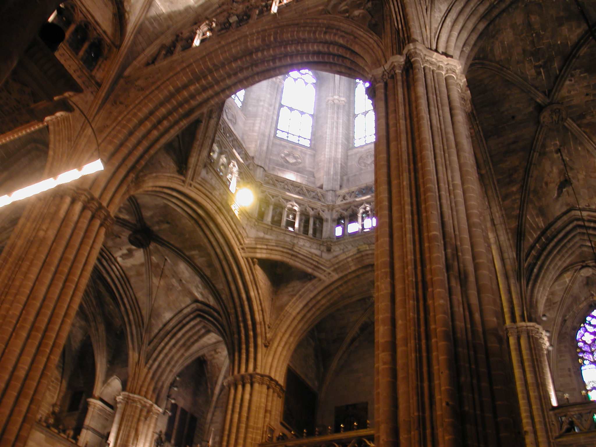 Catedral de Barcelona, vaults Barcelona